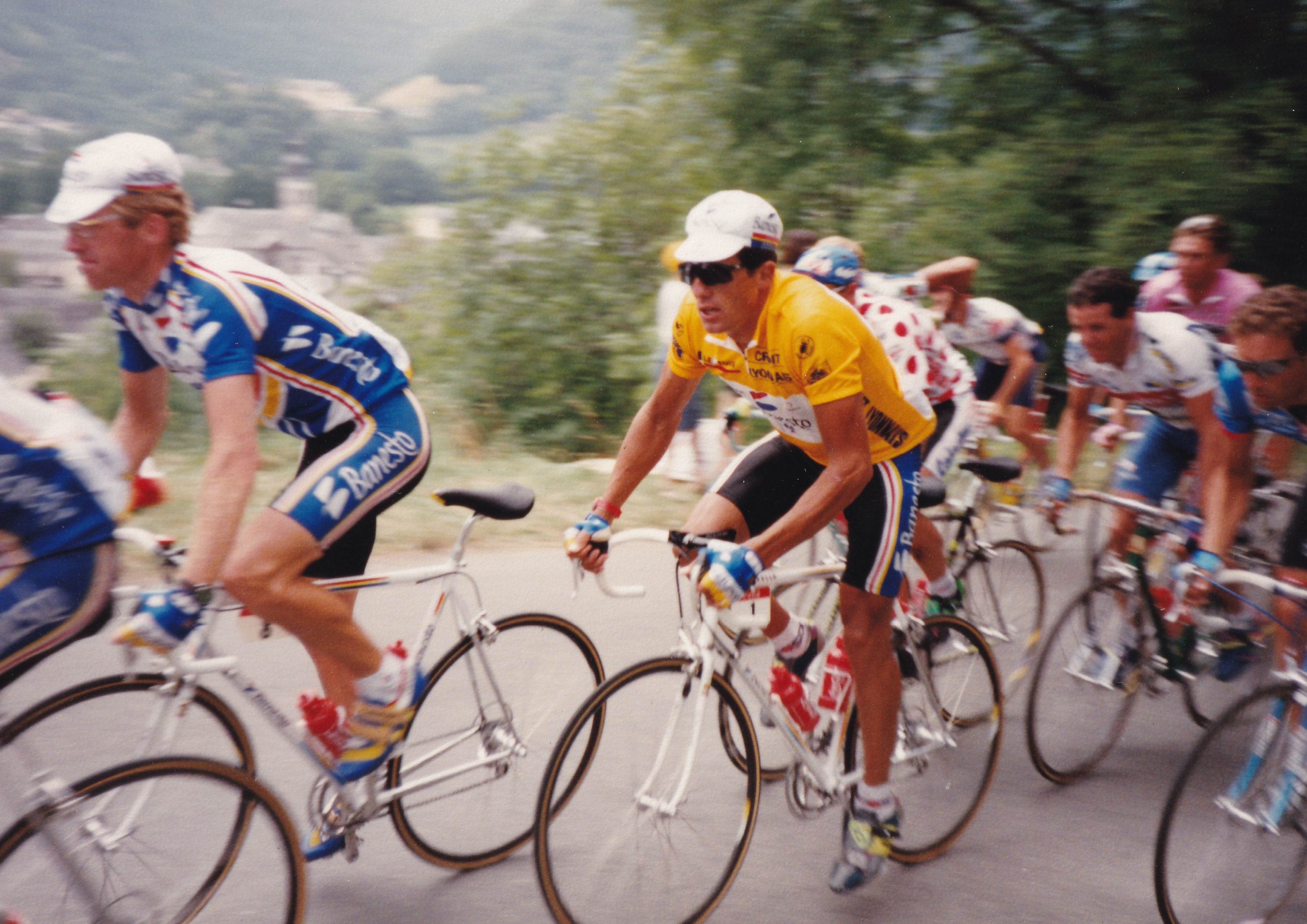 Miguel Indurain emmené par Gérard Rué à Arrens-Marsous dans l'étape entre Tarbes et Pau le 22 juillet 1993